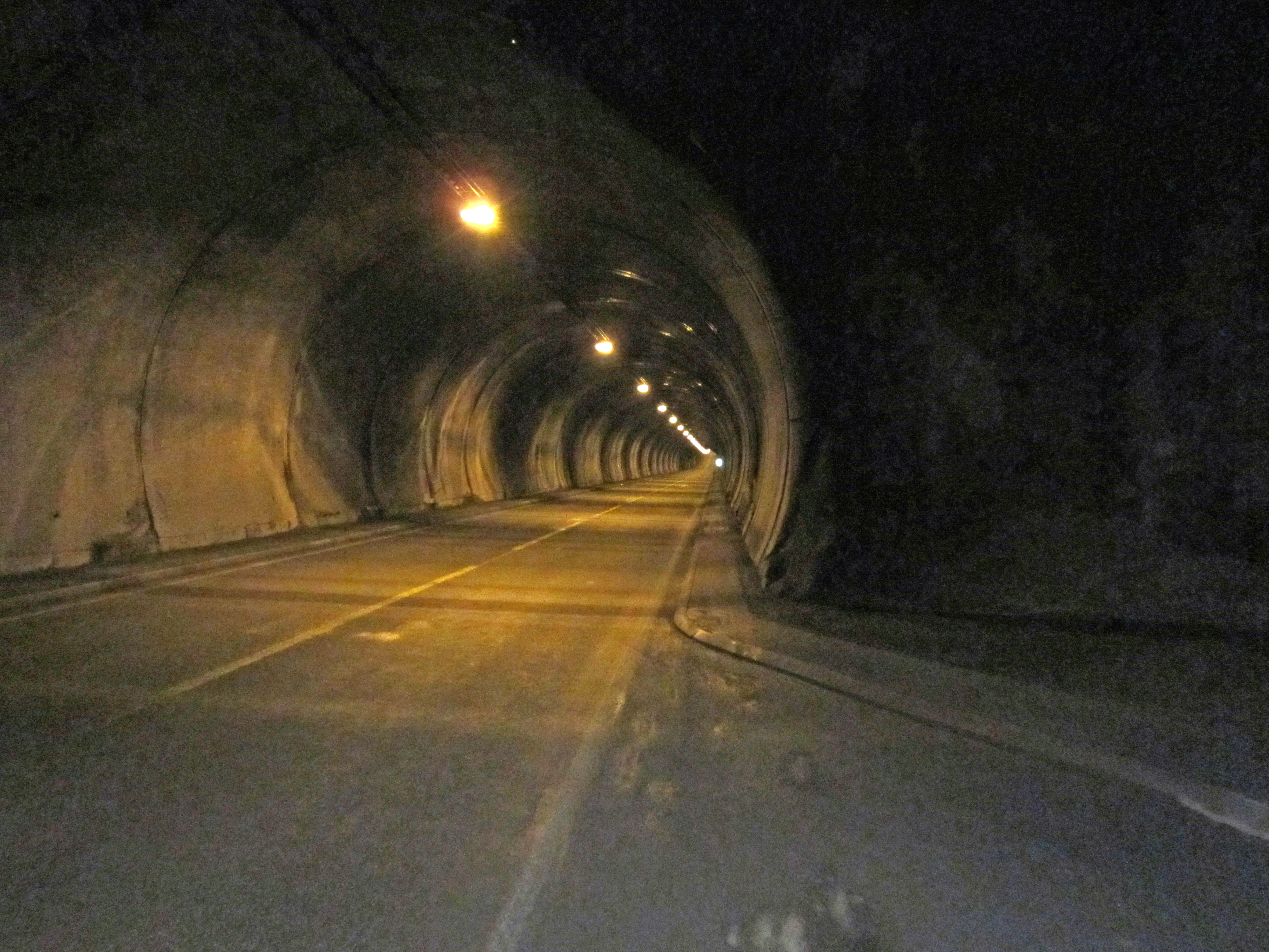 Nordkapptunnel Innenansicht